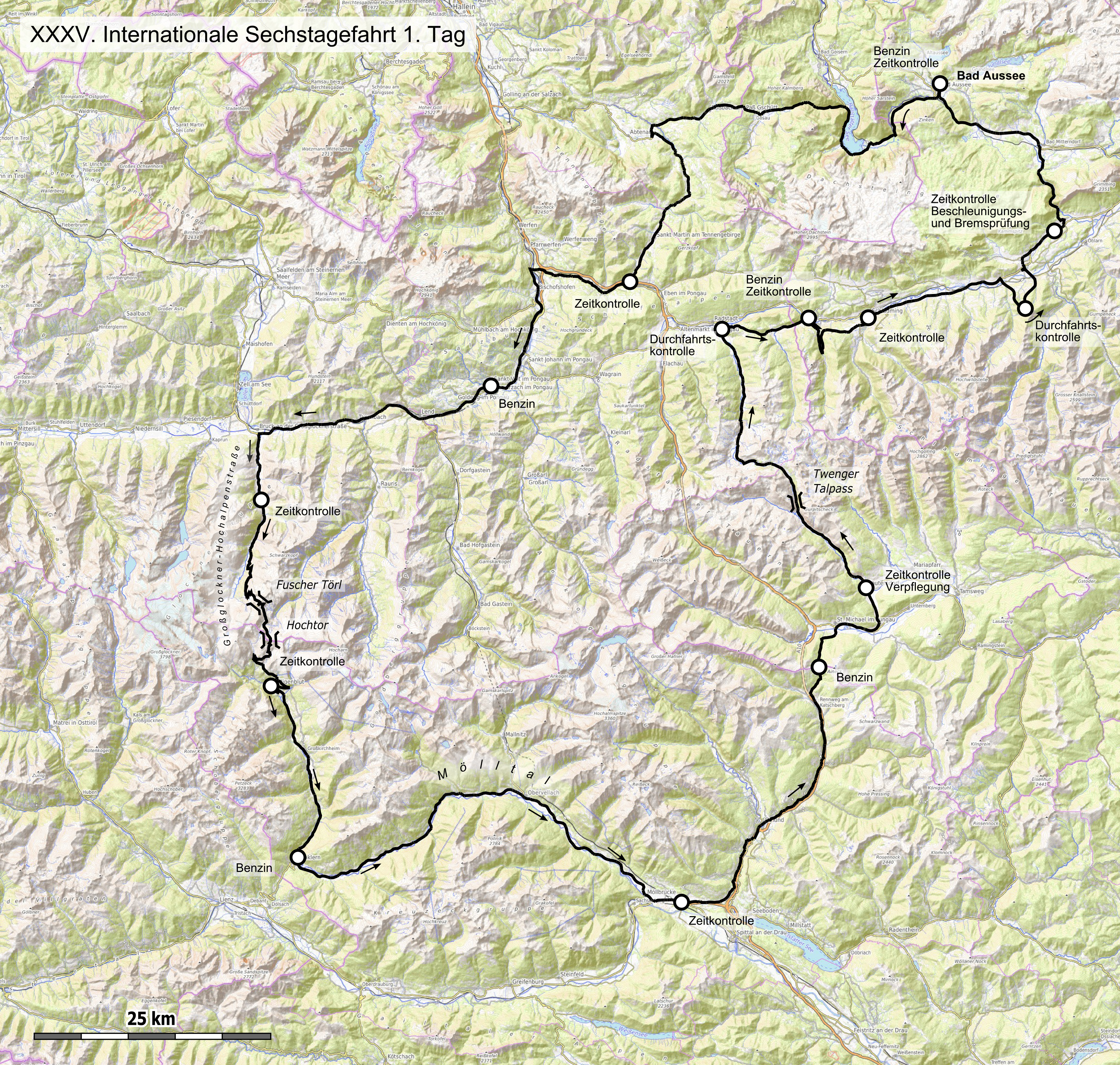 Karte der 35. Internationale Sechstagefahrt, Route des 1. Tages